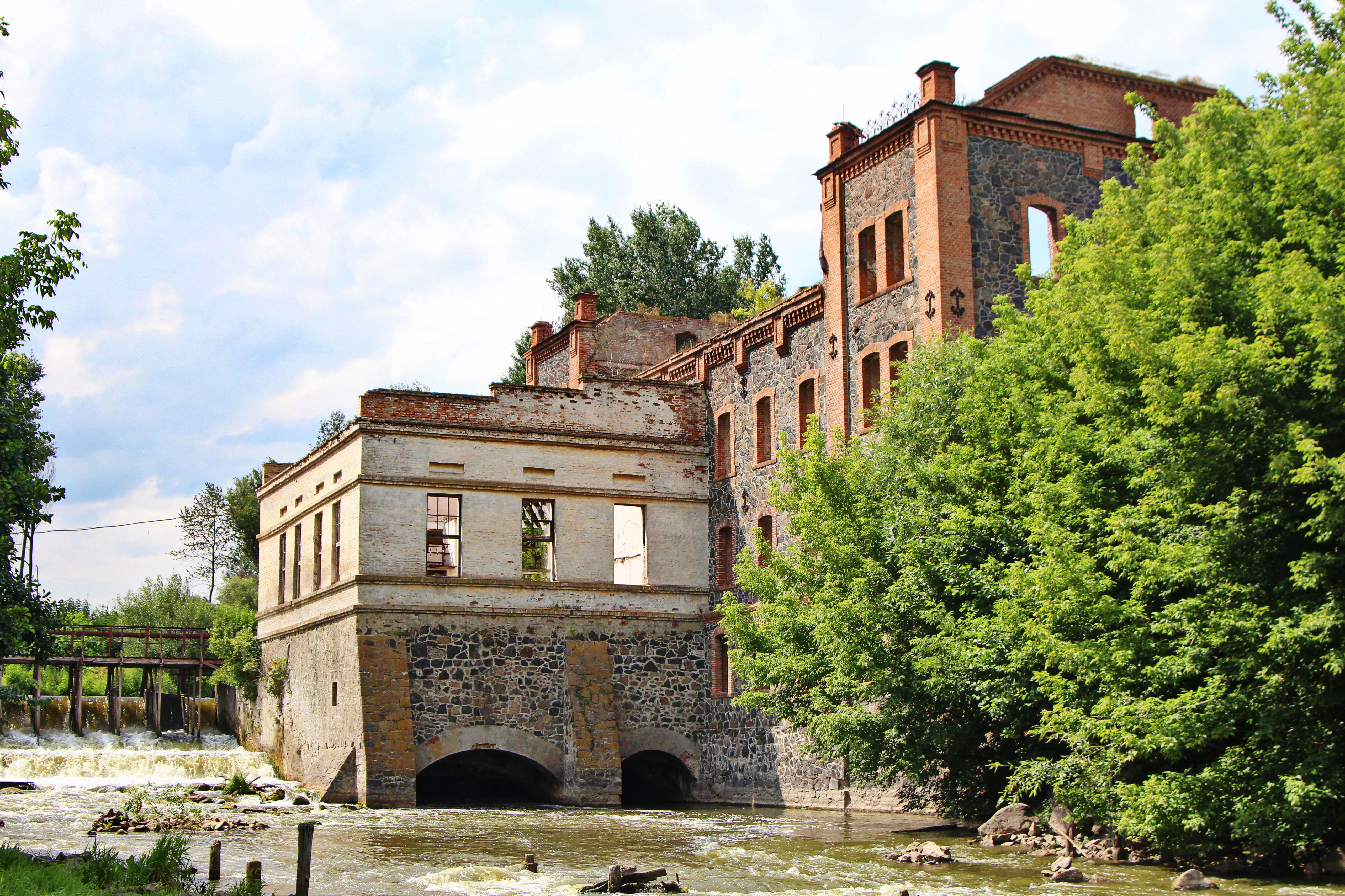 Електростанція та млин, Сокілець, вул. Леніна, 128